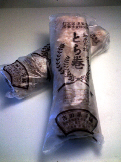 Toramaki(とら巻)